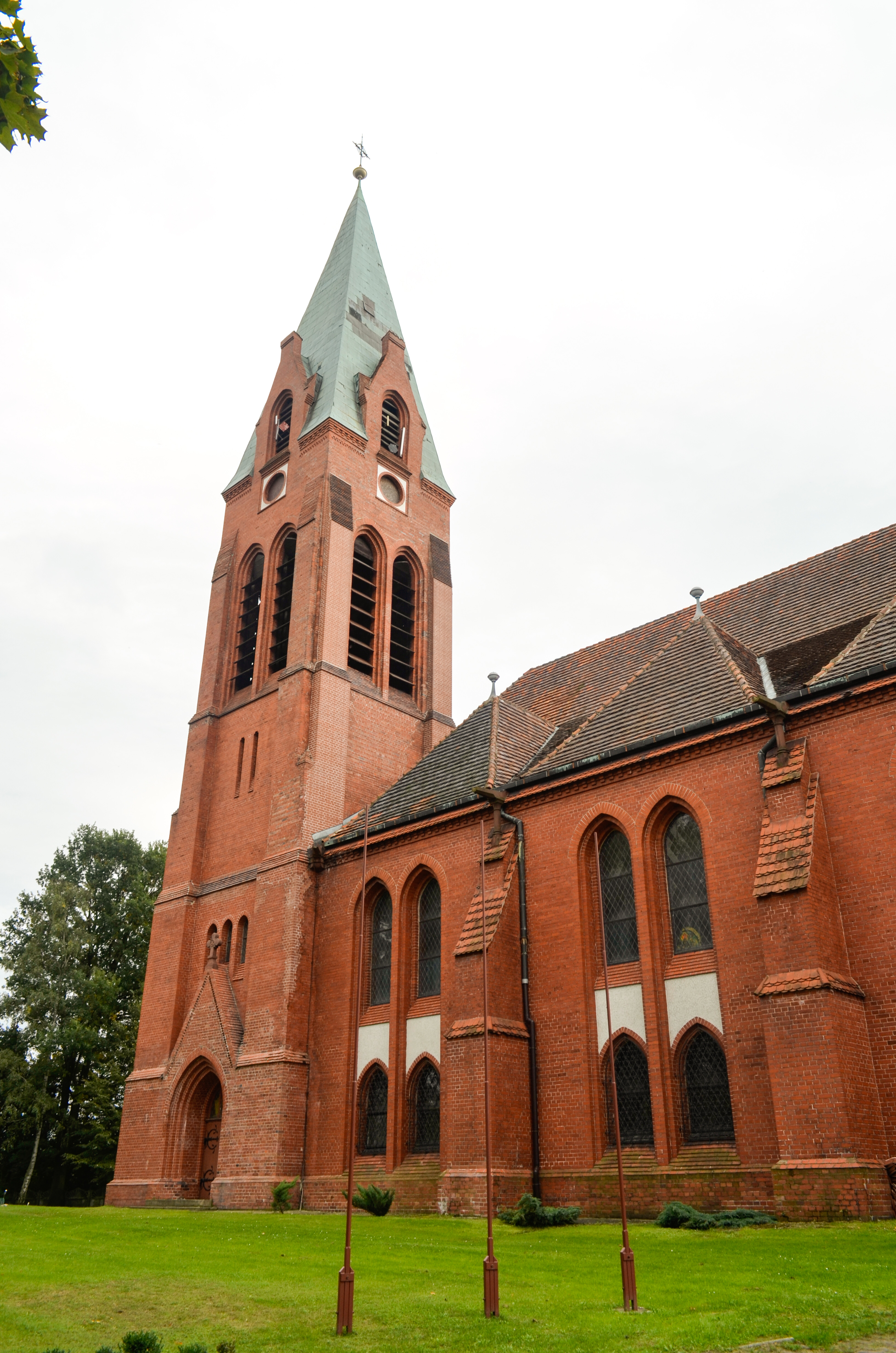 Żary, ul. Wyzwolenia - dawny kościół ewangelicki, obecnie rzymskokatolicki parafialny p.w. Matki Boskiej Szkaplerznej, 1895